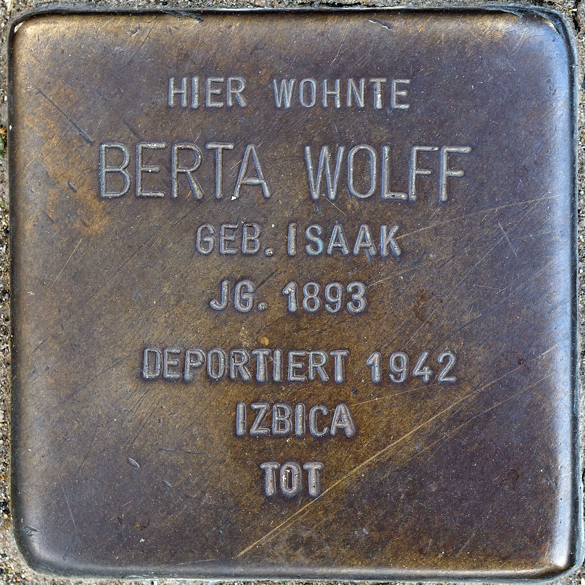 Stolpersteine MG: Wolff, Berta